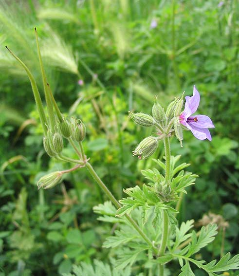 Erodium ciconium Photo prise à Ille-sur-Têt en mai 2004. Jean Tosti 2005